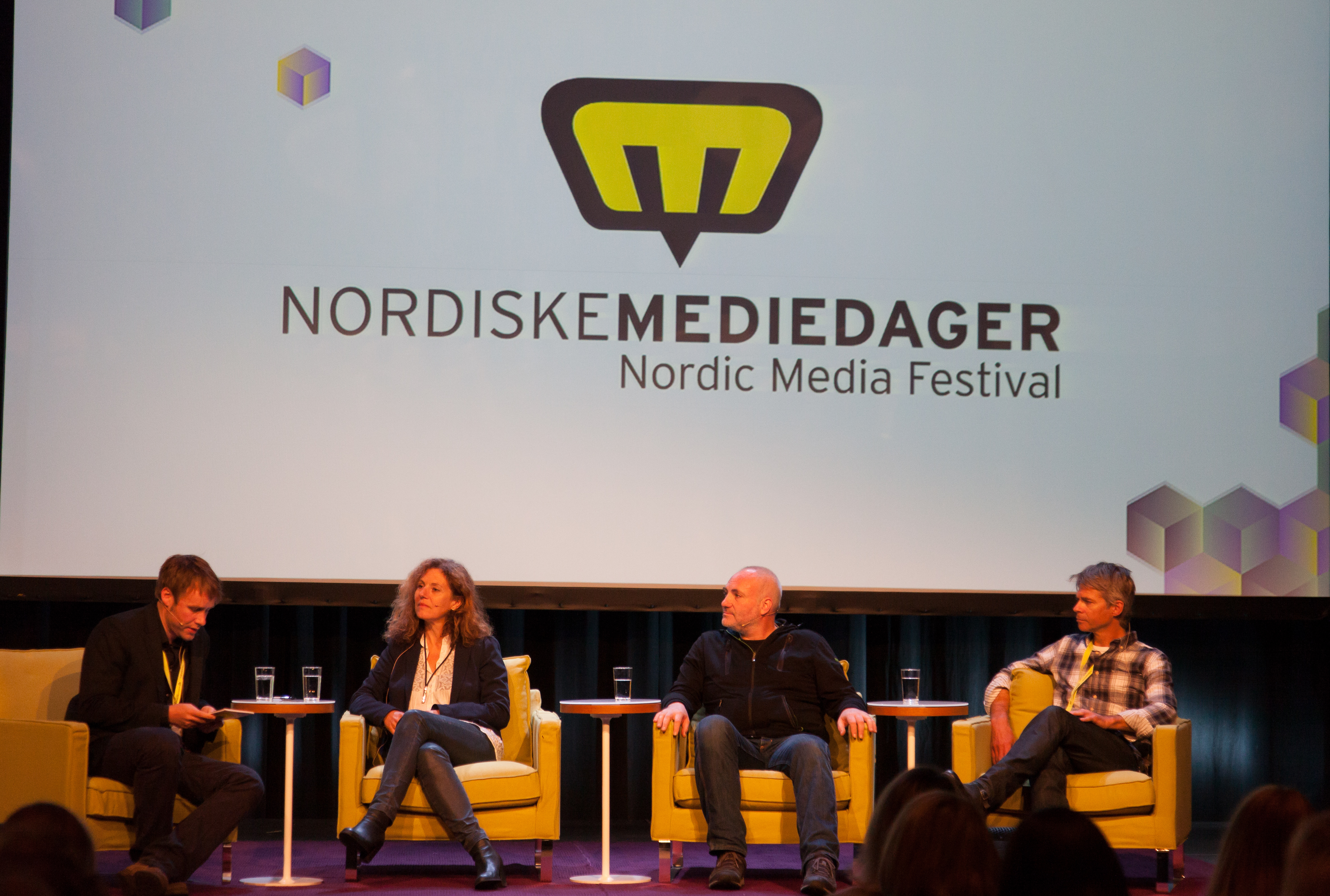 Foto : Kjetil Greger Pedersen/Nordiske Mediedager